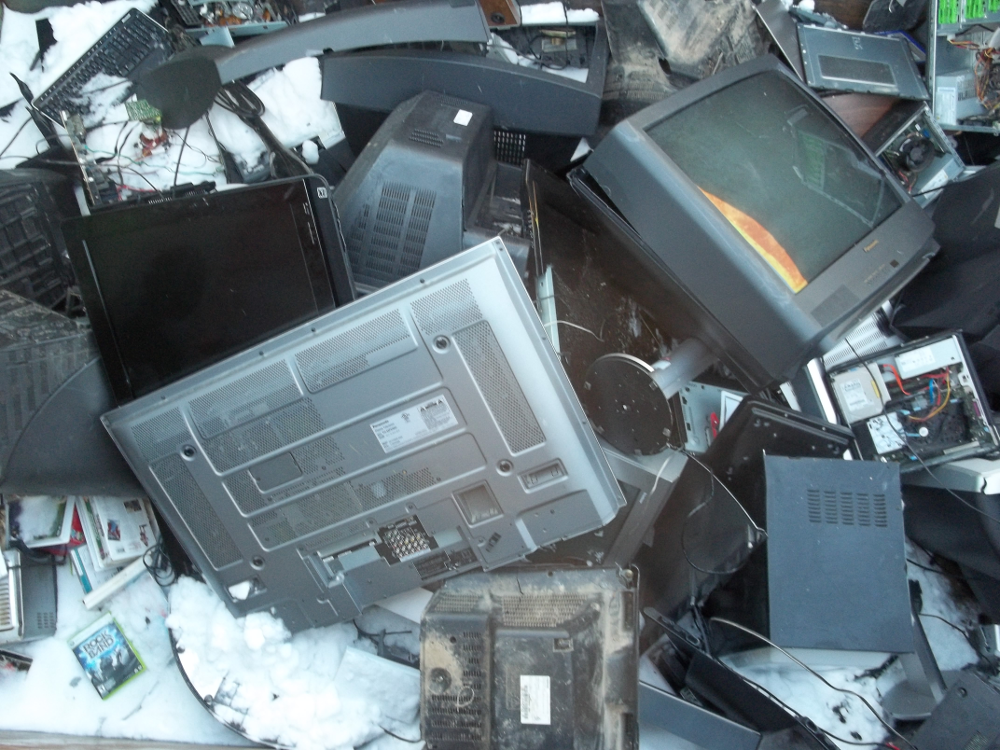 Waste electrical items accumulate at a dump.